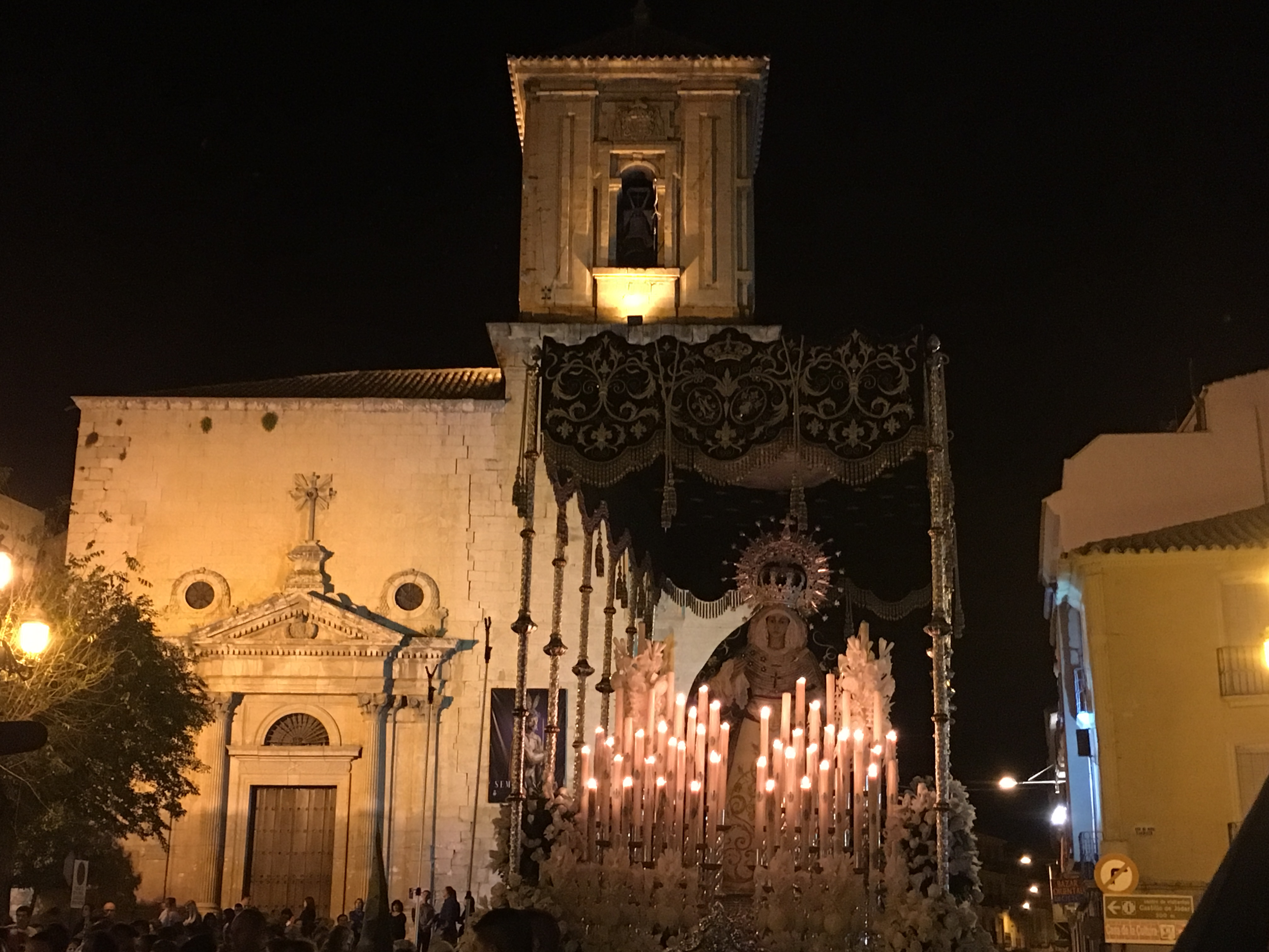 Nuestra Señora de la Esperanza en Plaza de España, Jódar